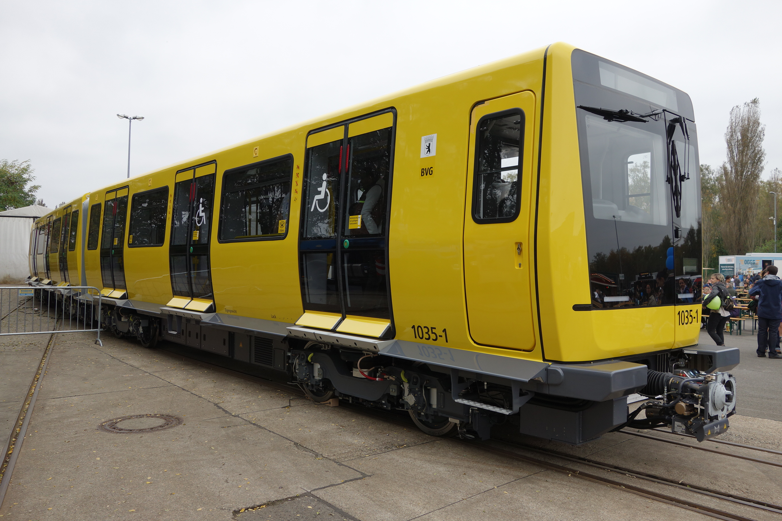 Fertigung eines U-Bahn-Zugs der Baureihe IK17 im Stadler Werk Pankow, Zug im Freigelände